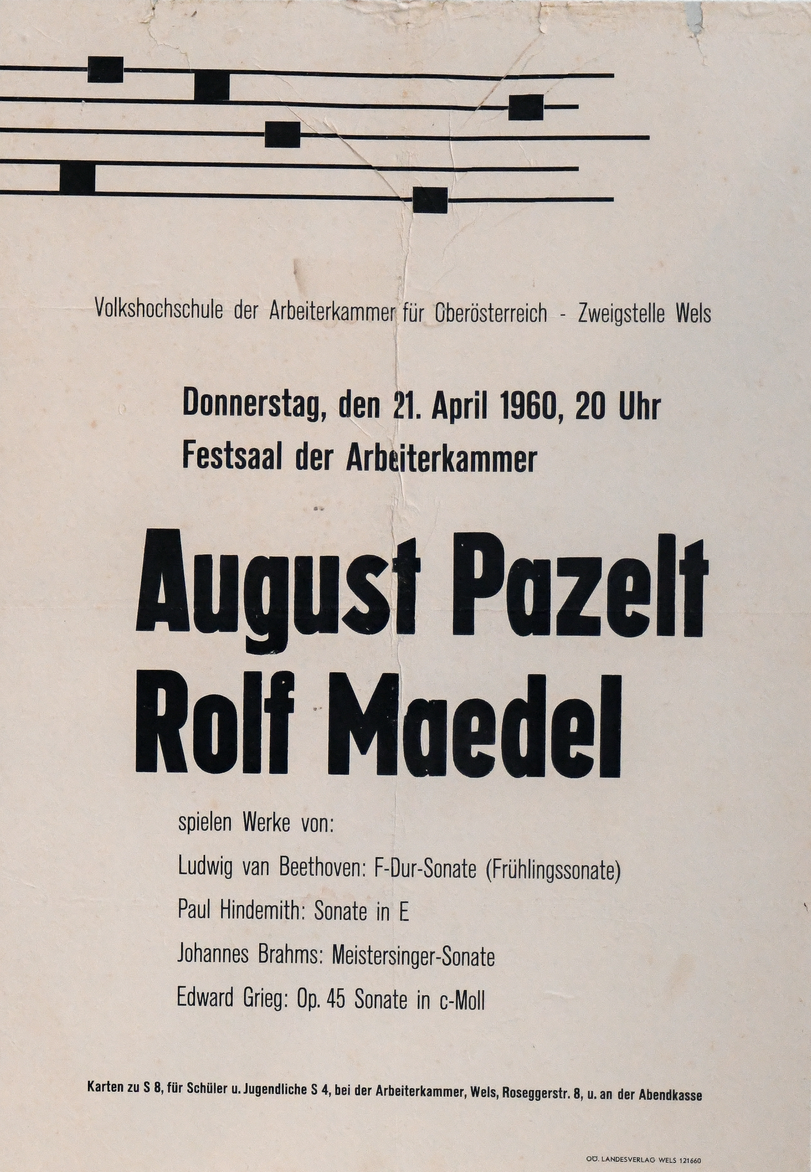 Konzertplakat August Pazelt und Rolf Maedel für 21. April 1960 in Wels